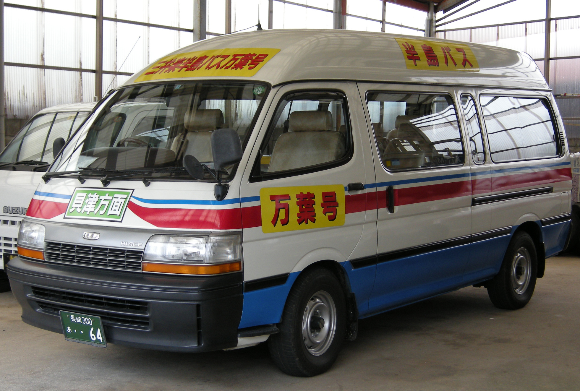 三井楽自動車（長崎県五島市） 三井楽半島バスの車両